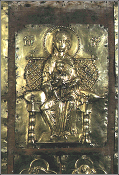 Pala d'altare esposta al museo del Torcello